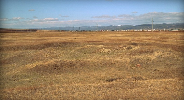 Иволгинское городище. Бурятия, Улан-Удэ